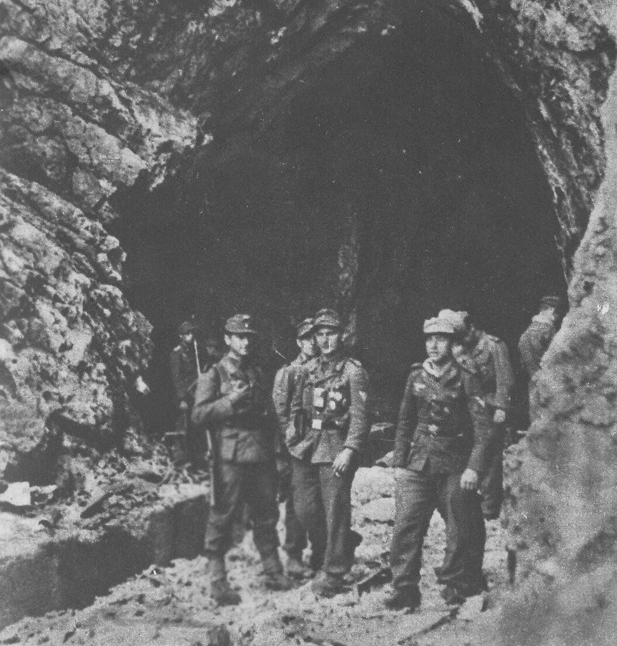 Deutsche Soldaten (Heer (Wehrmacht)) während der Operation (Unternehmen Rösselsprung – 1944) vor Titos Höhlenversteck, 25. Mai 1944. Srpskohrvatski / српскохрватски: Nemci ispred pećine u Drvaru u kojoj se nalazi Vrhovni štab NOVJ i maršal Tito, 25. maja 1944.